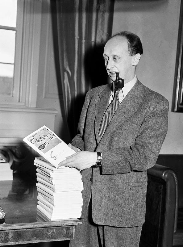 Borgarrådet Hjalmar Mehr presenterar boken ""Stockholm - Staden på vattnet"", en redogörelse av kommunalförvaltningen om staden och stockholmarnas liv och förhållanden